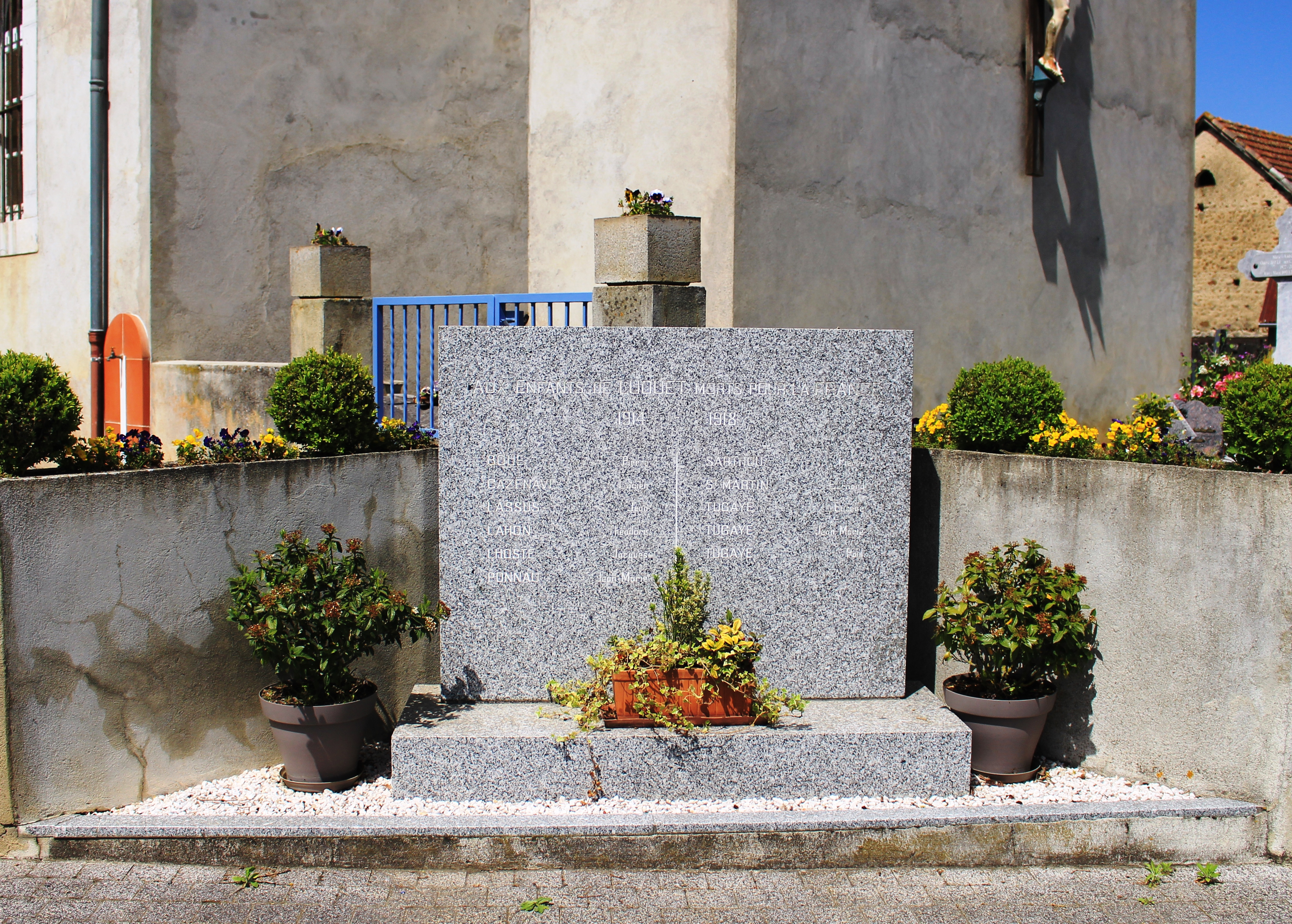 Monument aux morts de Luquet (Hautes-Pyrénées)